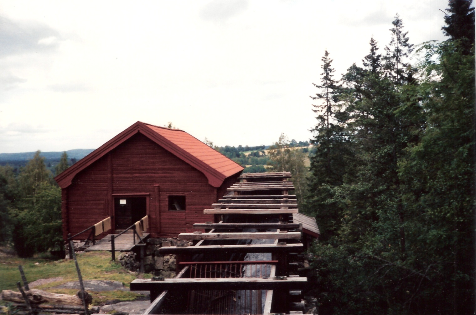 Die Wassermühle Råås (Ydre kommun, Östergötland, Schweden)